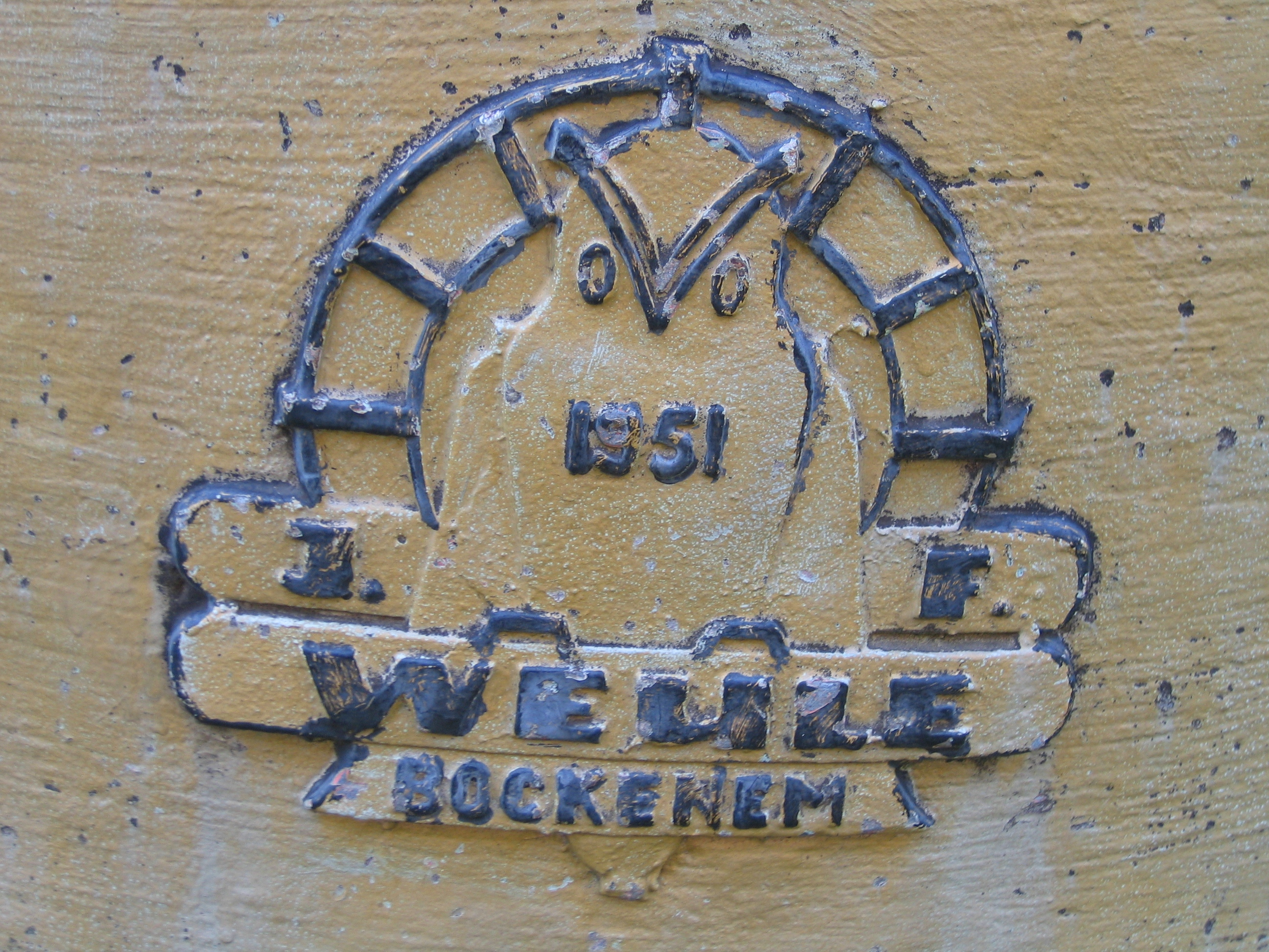 Glockengießerzeichen von J. F. Weule auf der e-Glocke von 1951 auf der Außenanlage der Evangelisch-reformierten Kirche in Wölfersheim.